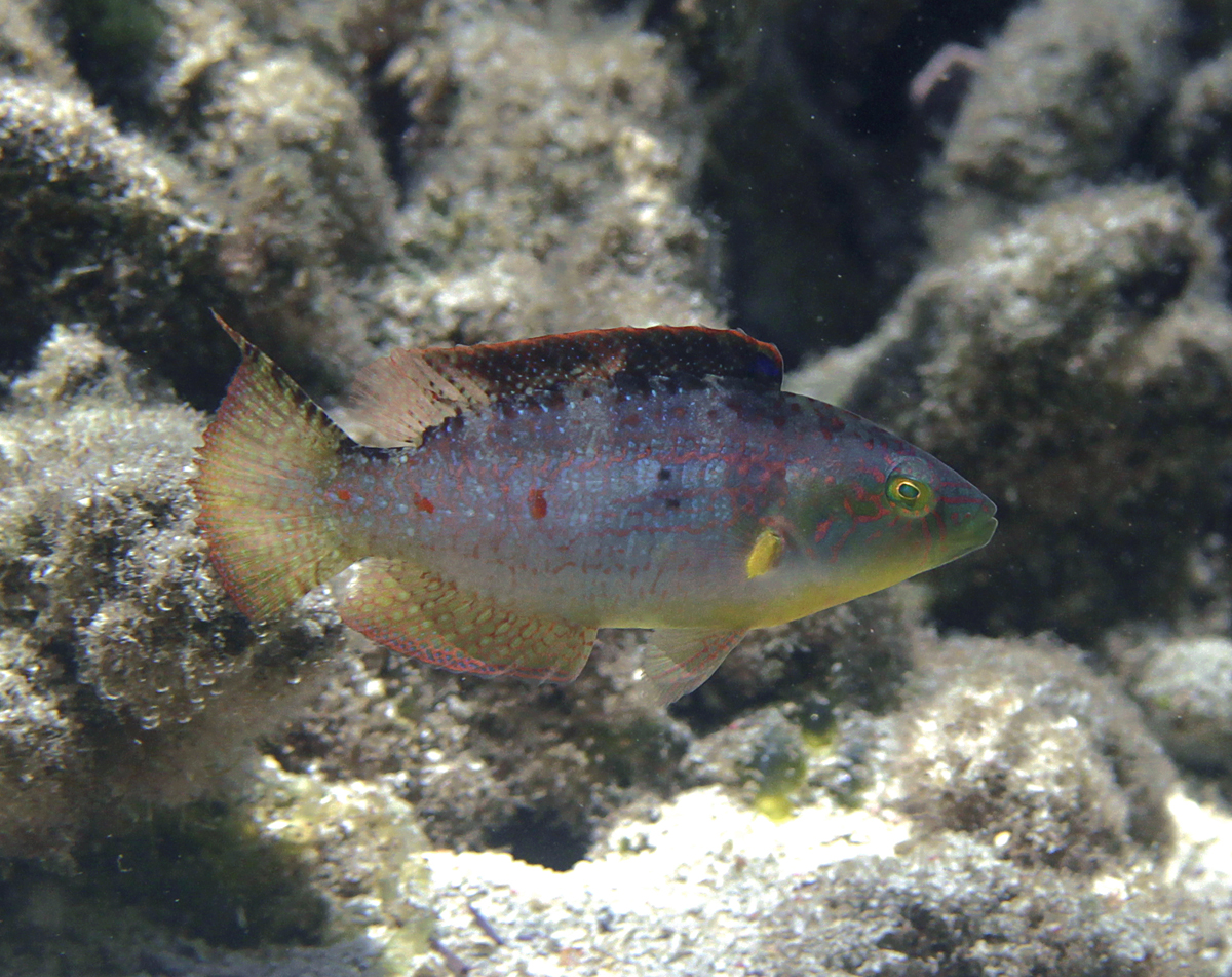 Un labre à queue de comète (Oxycheilinus bimaculatus) à la Réunion.